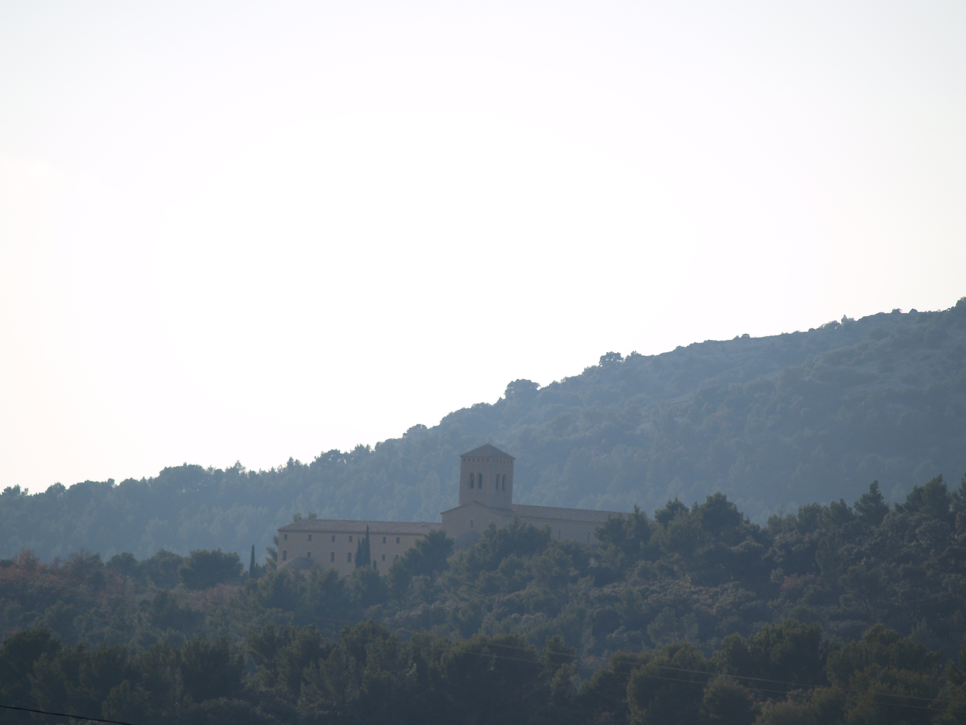 pris par moi même en décembre 2005 Bigor